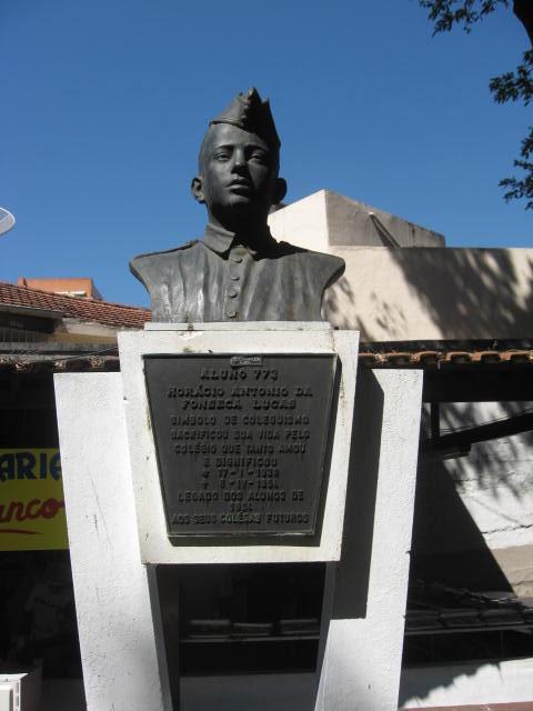 Estátua do aluno Horácio Lucas, localizado no Colégio Militar do Rio de Janeiro